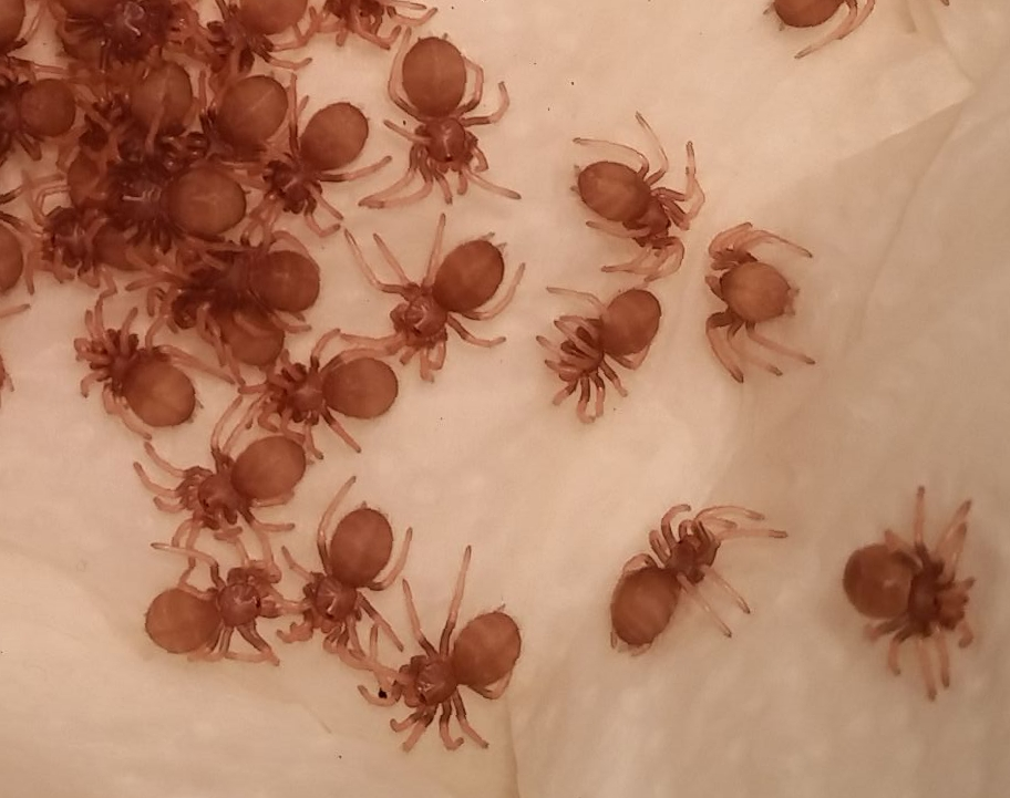 Chromatopelma Cyaneopubescens in L2